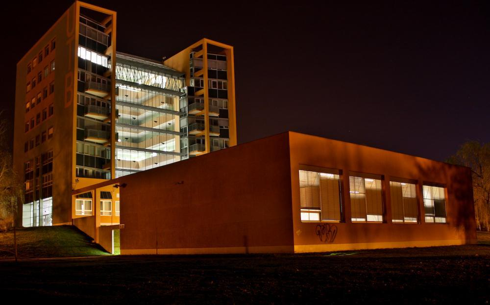 Budova Fakulty aplikované informatiky Univerzity Tomáše Bati ve Zlíně